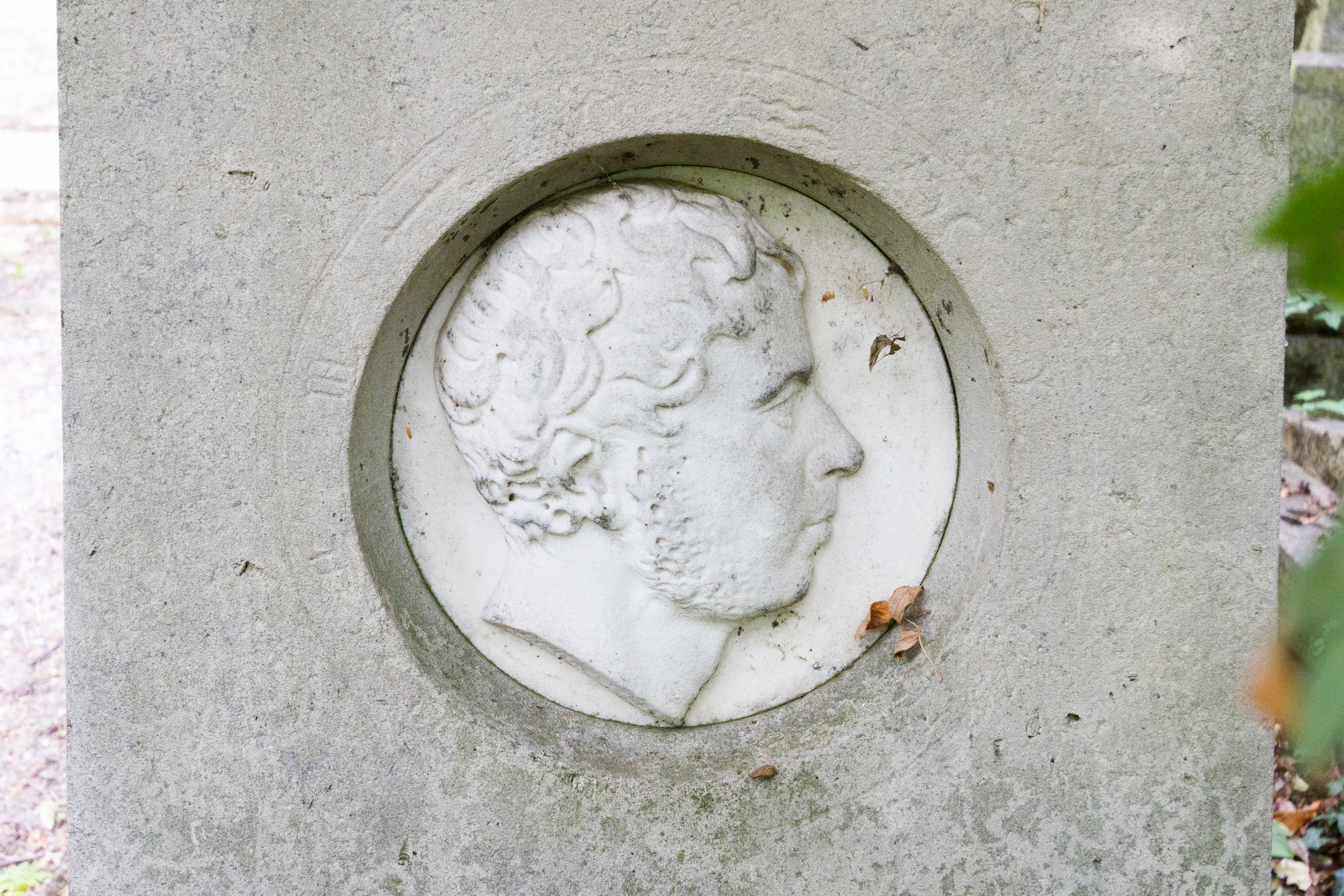 Sépulture de Jean-Jacques Castex (1731-1822), sculpteur qui fit partie de l'Expédition d'Égypte.